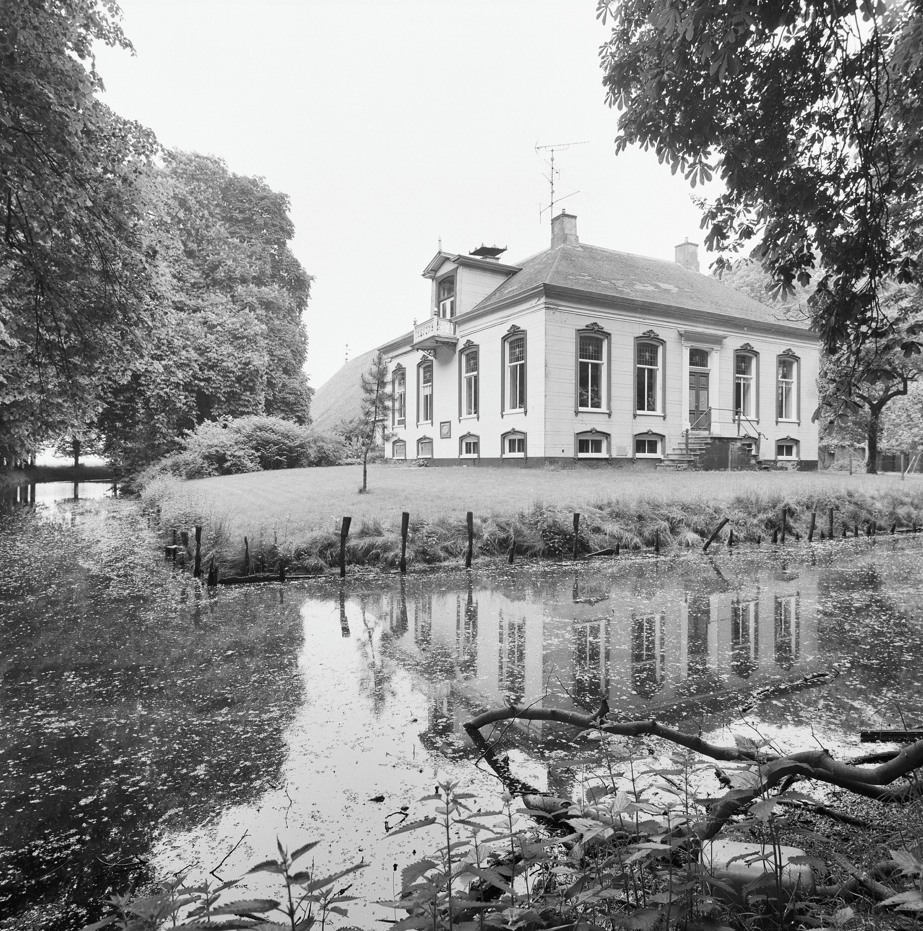 Boerderij Pollux: Overzicht voorgevel en linker zijgevel voorhuis (opmerking: Gefotografeerd voor Monumenten In Nederland Groningen)